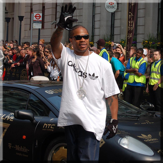 Xzibit